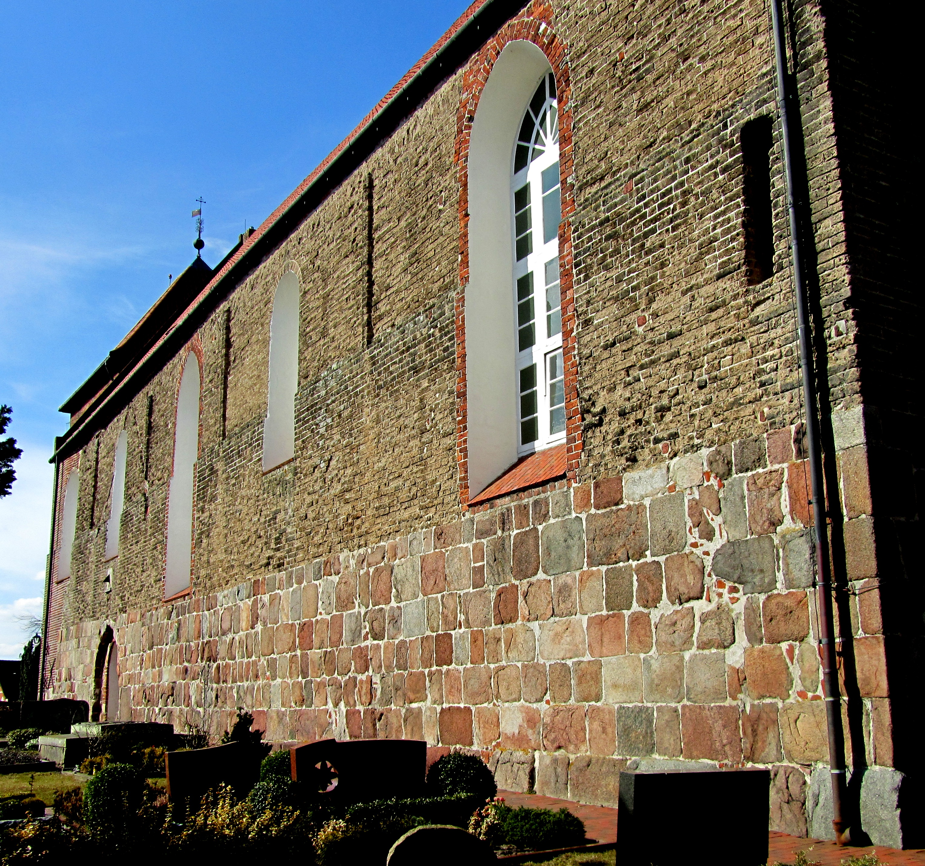 Südseite der St.-Stephanus-Kirche in Schortens, Niedersachsen, Deutschland